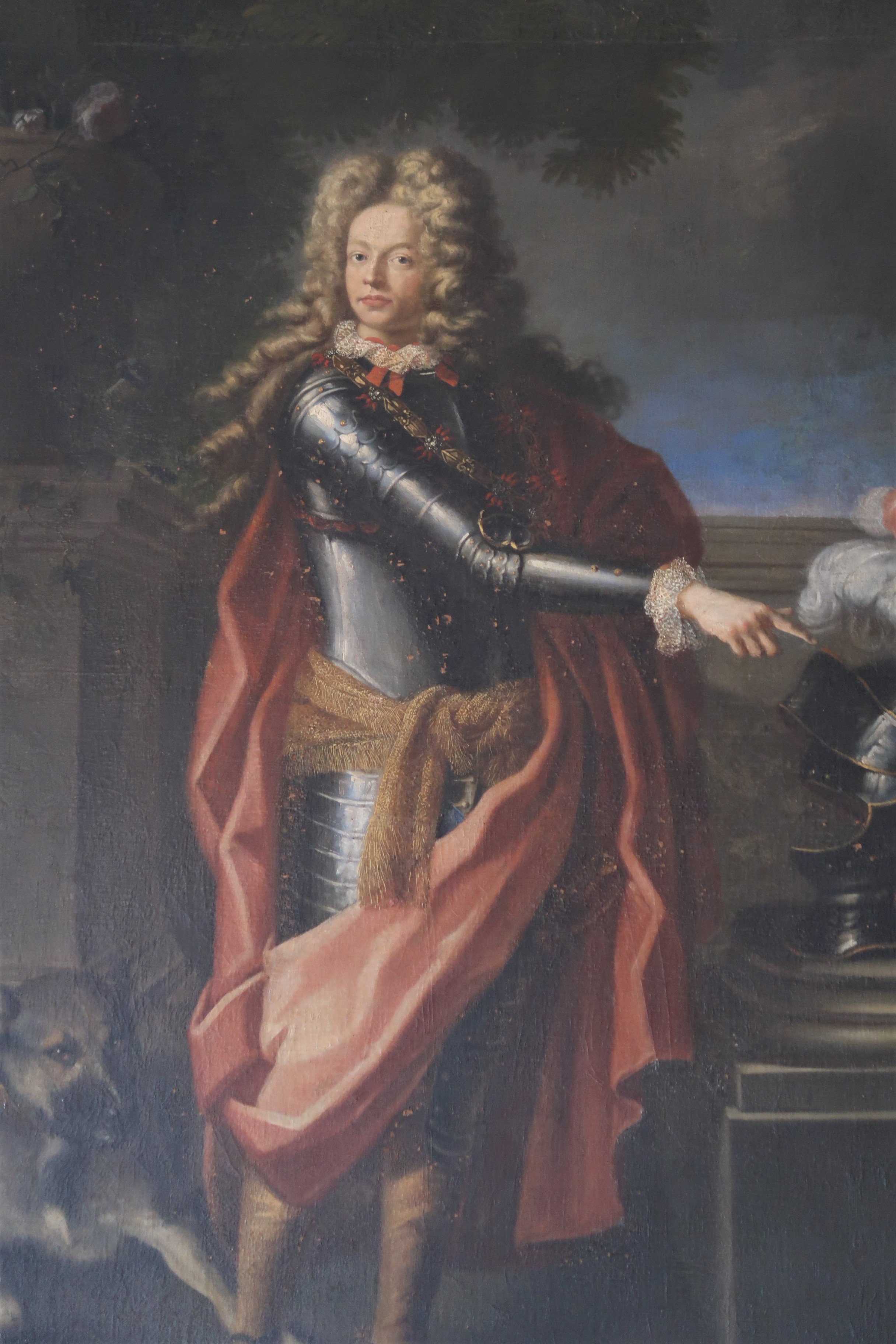 Portrét hraběte Adama Matyáše z Trauttmansdorffu na zámku Horšovský Týn